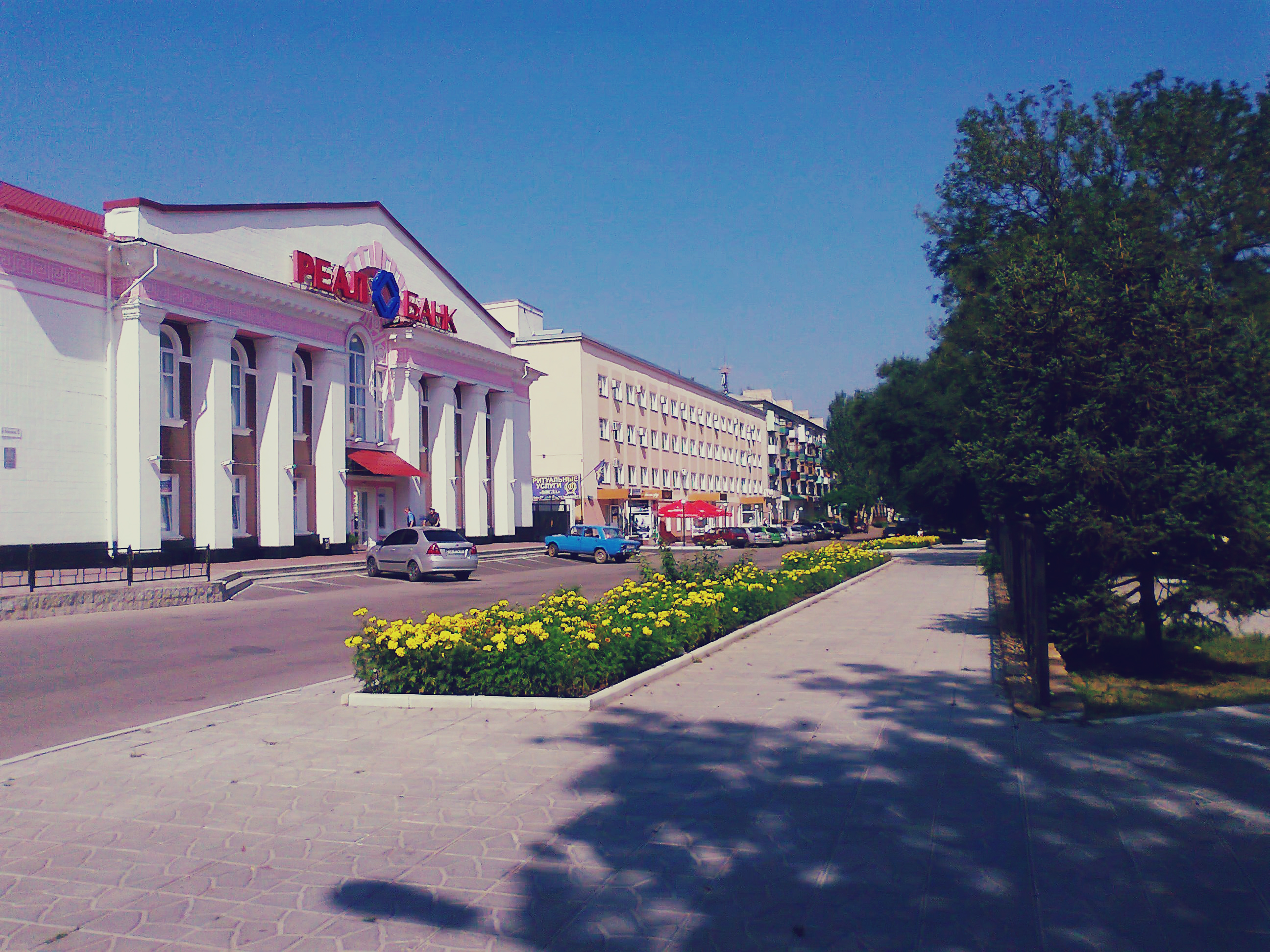 Старий центр м. Лисичанськ